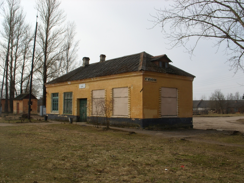 Вокзал в Гдове.